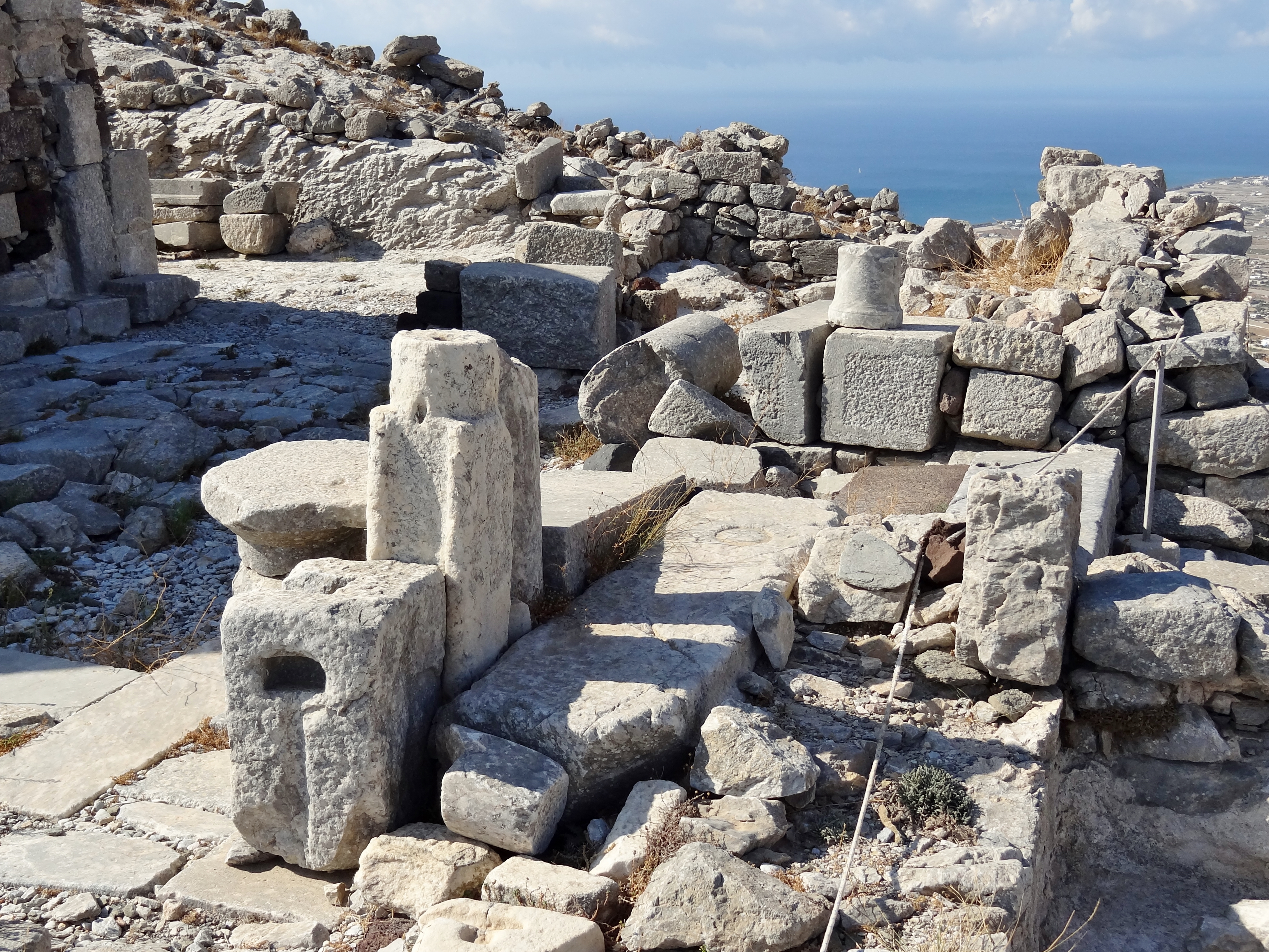 Reste der frühchristlichen Basilika vor der Kirche Agios Stefanos (Άγιος Στέφανος) in Alt-Thera, Santorin, Kykladen, Griechenland